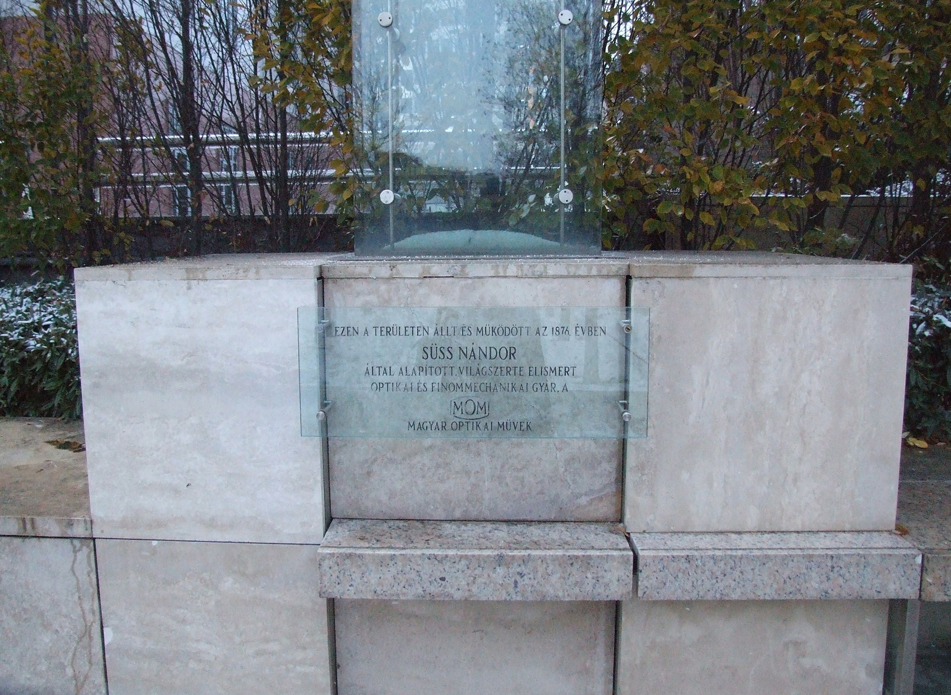 Süss Nándor és a MOM emléktáblája Budapesten, XII. kerület Dolgos utca 2. (MOM-park)